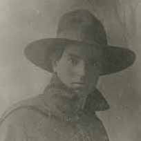 Снимка на анархиста Георги Шейтанов (1896-1925).